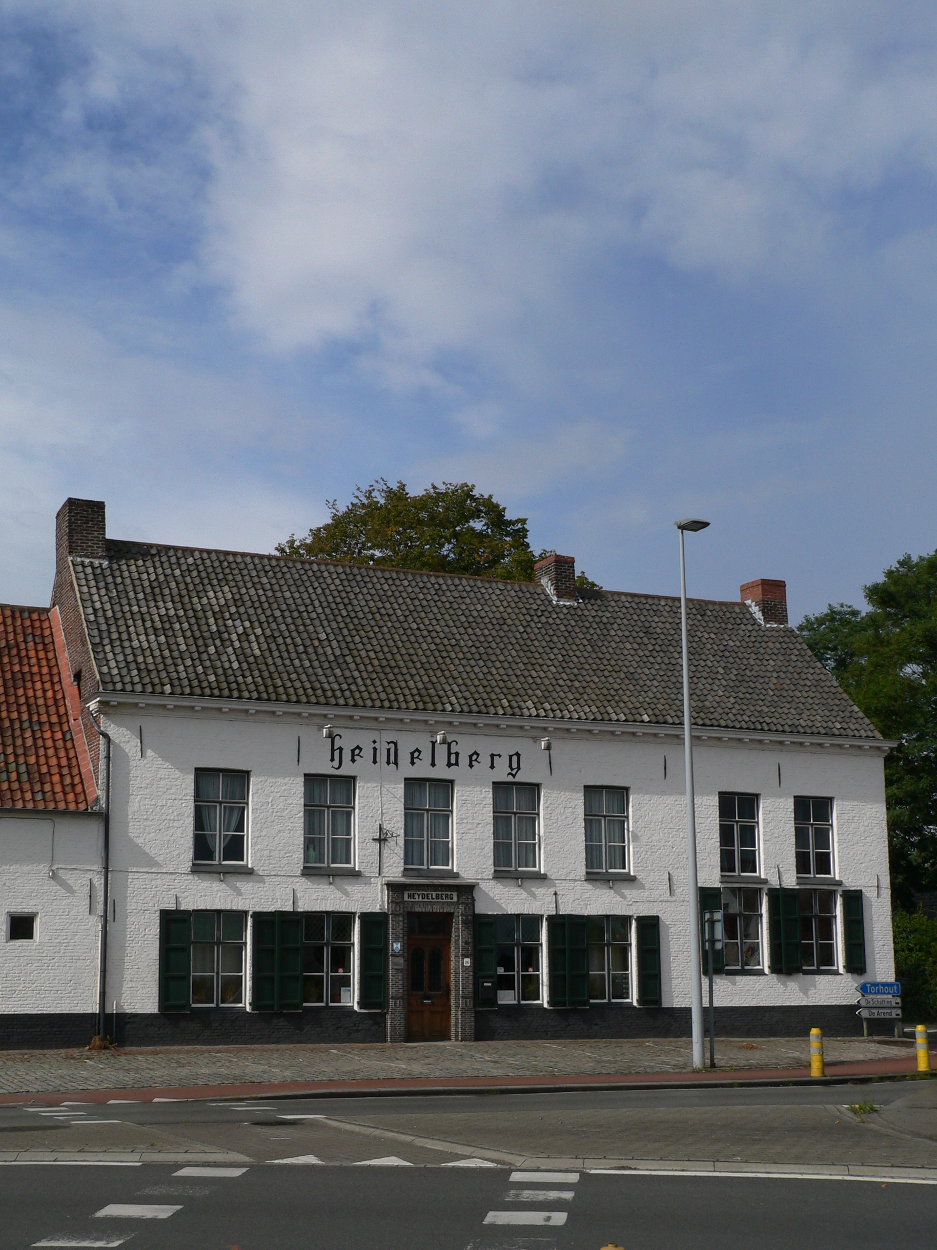 Herberg Heidelberg, langs de Torhoutsesteenweg. De herberg kwam er als tolhuis en afspanningsplaats voor de paarden in 1763, en hangt samen met de aanleg van de Torhoutsesteenweg van Brugge naar Torhout.